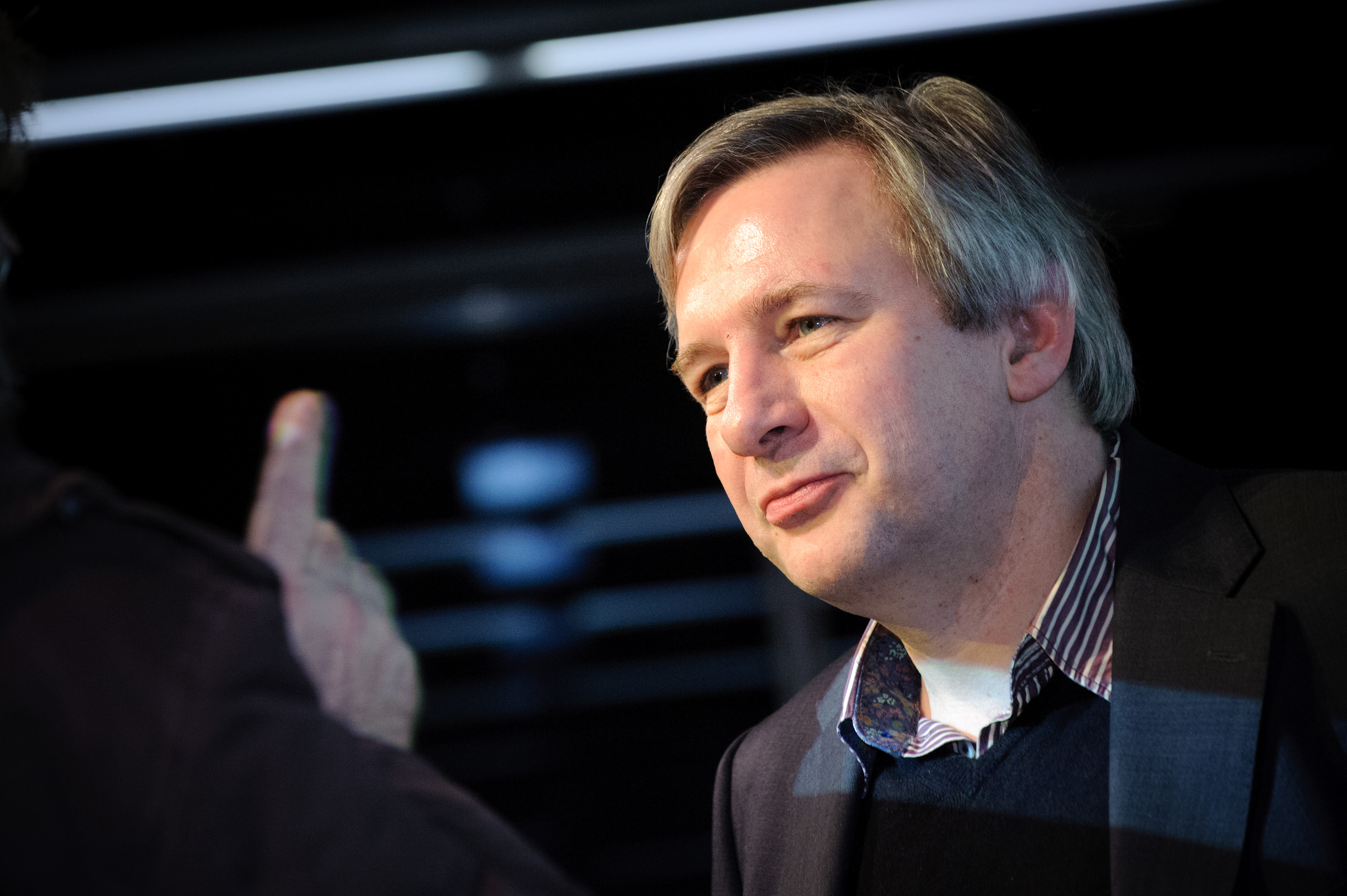 Frank Schimmelfennig (Eidgenössische Technische Hochschule Zürich, Schweiz) Regime Change Streitgespräch im Rahmen der Vorlesungsreihe "Externe Demokratieförderung und geteilte Zivilgesellschaft" im postsozialistischen Europa, die von Kollegiatinnen des Promotionskollegs Zivilgesellschaft und externe Demokratisierung der Heinrich-Böll-Stiftung organisiert wird. Mit: Ralf Fücks, Vorstand Heinrich-Böll-Stiftung Srdja Popovic, CANVAS, Serbien Tatiana Poshevalova, Konsortium EUROBELARUS, Weißrussland Frank Schimmelfennig, Eidgenössische Technische Hochschule Zürich, Schweiz Moderation: Irene Hahn, Europa-Universität Viadrina Foto: Stephan Röhl